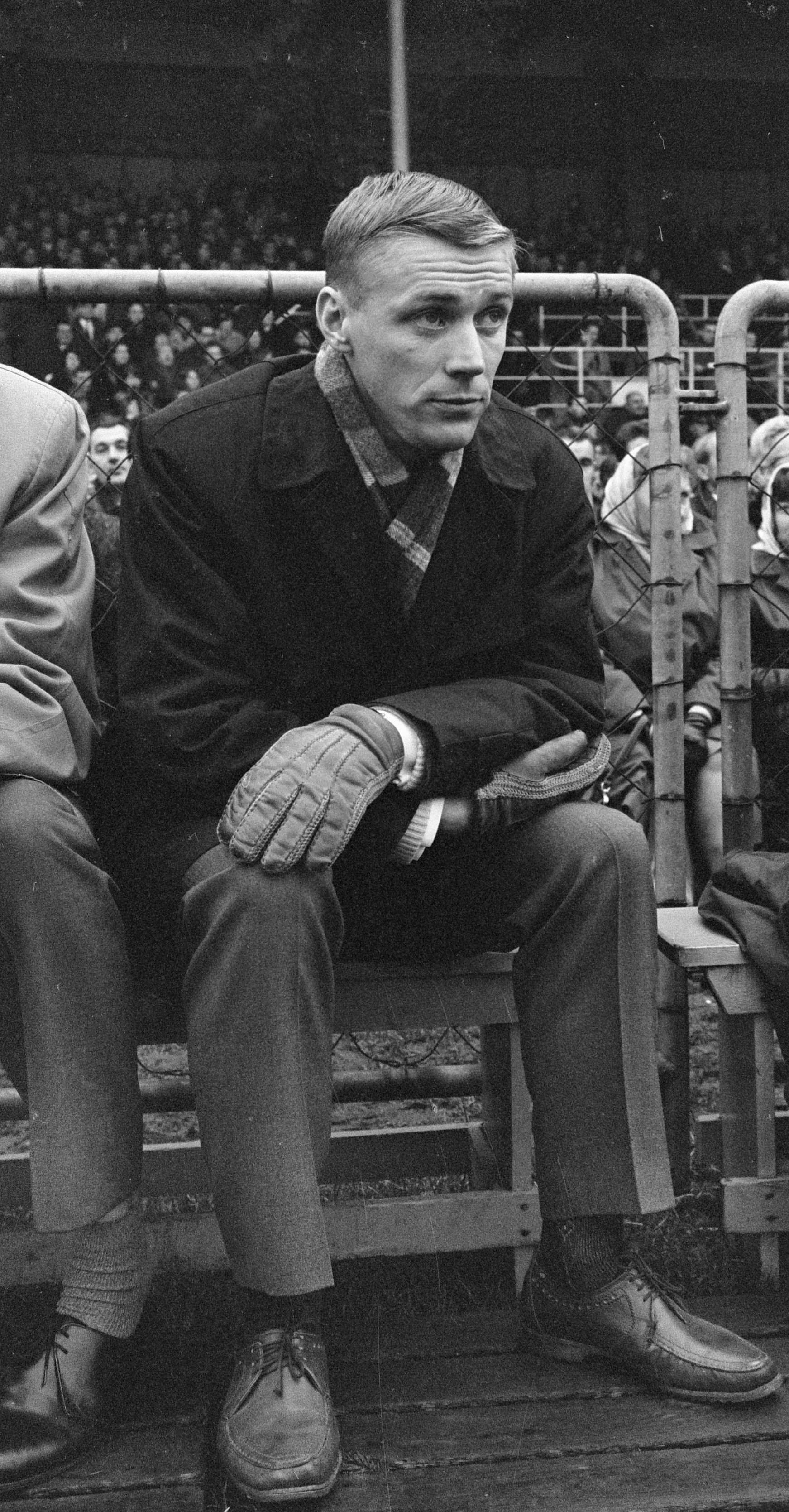 Voetbalwedstrijd DOS - Feyenoord te Utrecht: 0-3; Zweedse Feyenoord-speler Harry Bild op de tribune bij DOS